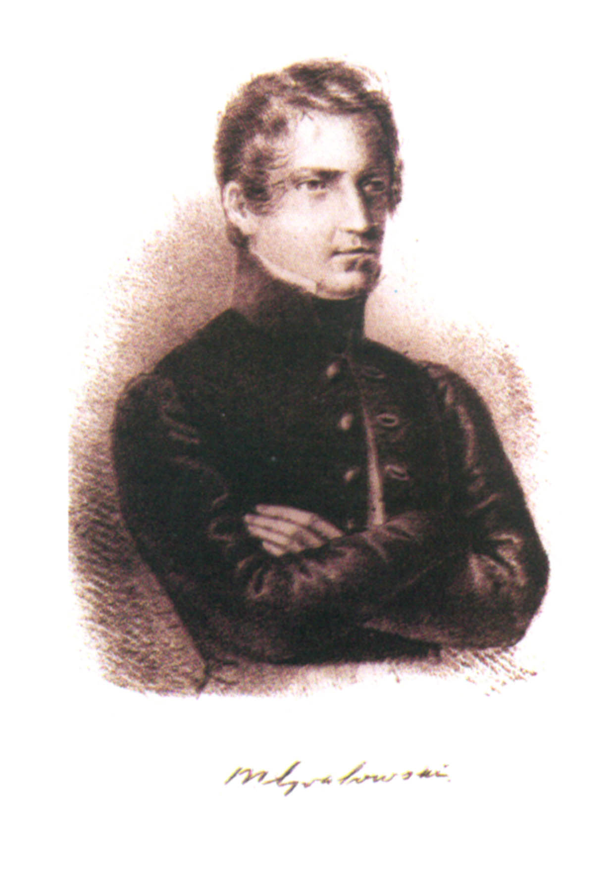 Michał Grabowski (1804-1863) - polski powieściopisarz, publicysta i krytyk literacki.